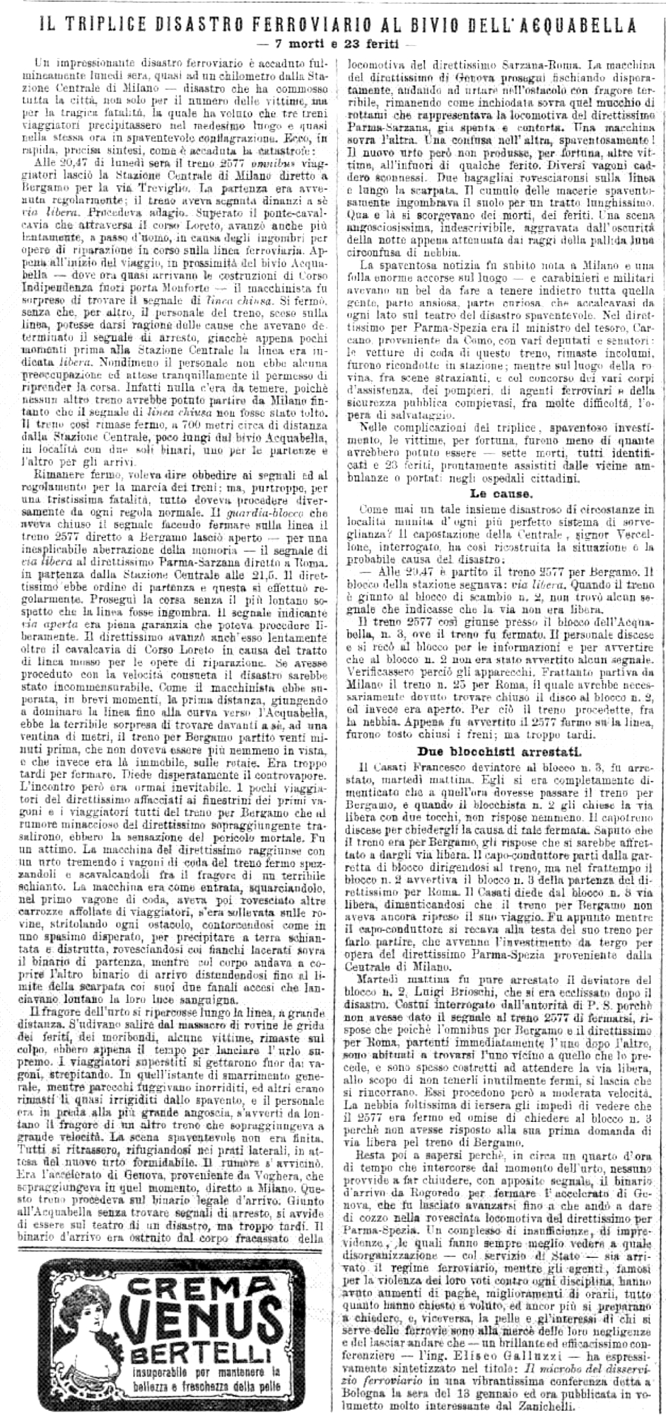 Articolo apparso su Illustrazione Italiana del febbraio 1908 relativo al disastro ferroviario dell'Acquabella, Milano, occorso il 20 gennaio 1908